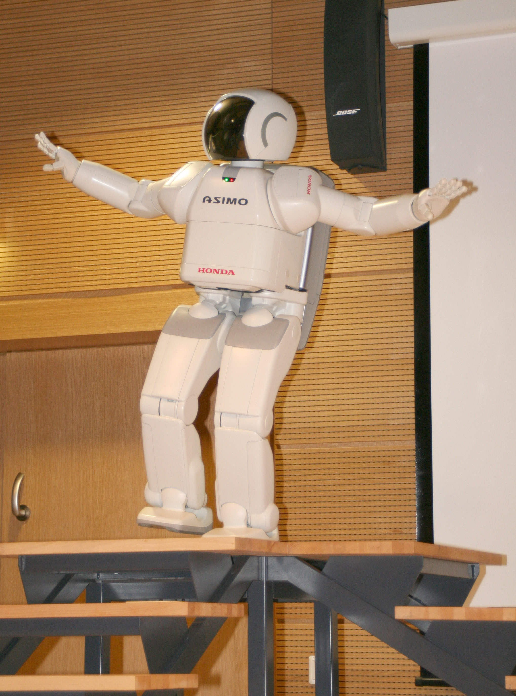 ASIMO 116.